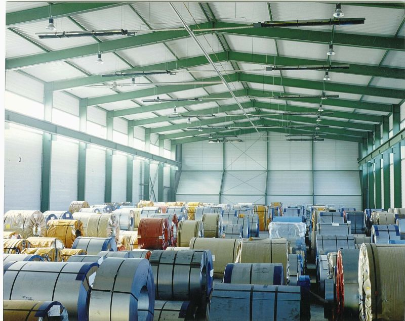 Coi-Lagerhalle in Heilbronn